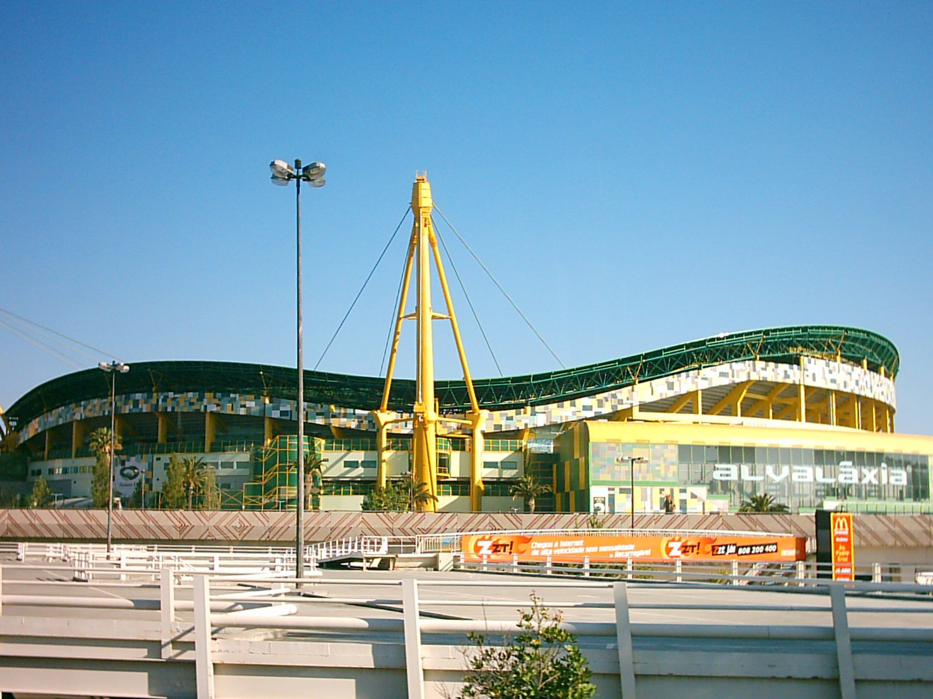 Estádio do Sporting Clube de Portugal, Portugal